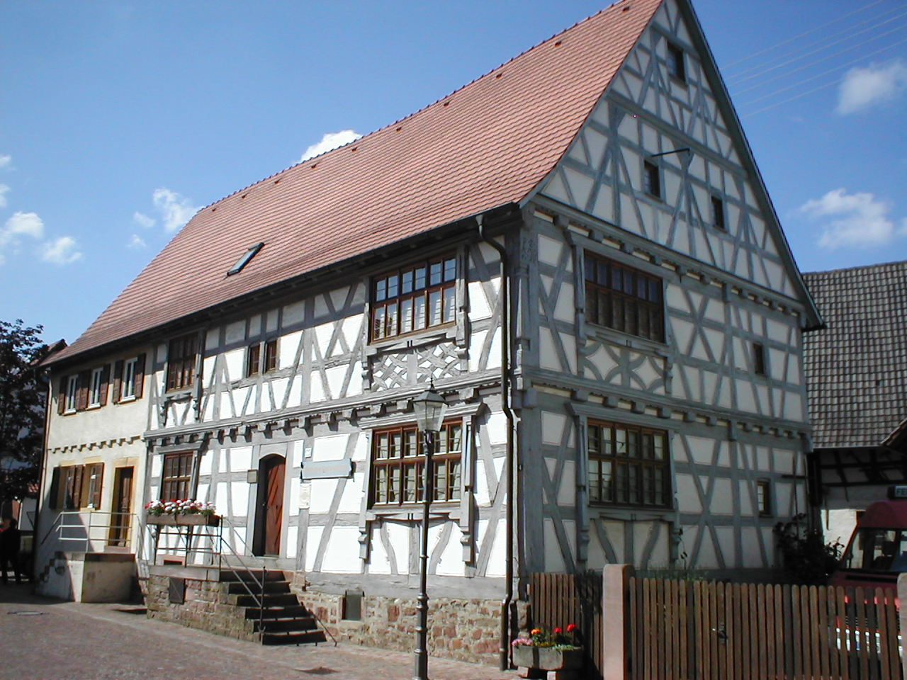 Heimatmuseum in Epfenbach, ehemaliger Fronhof des Klosters Lobenfeld, nachgewiesen seit dem 15. Jhd, dieses Gebäude von 1718.